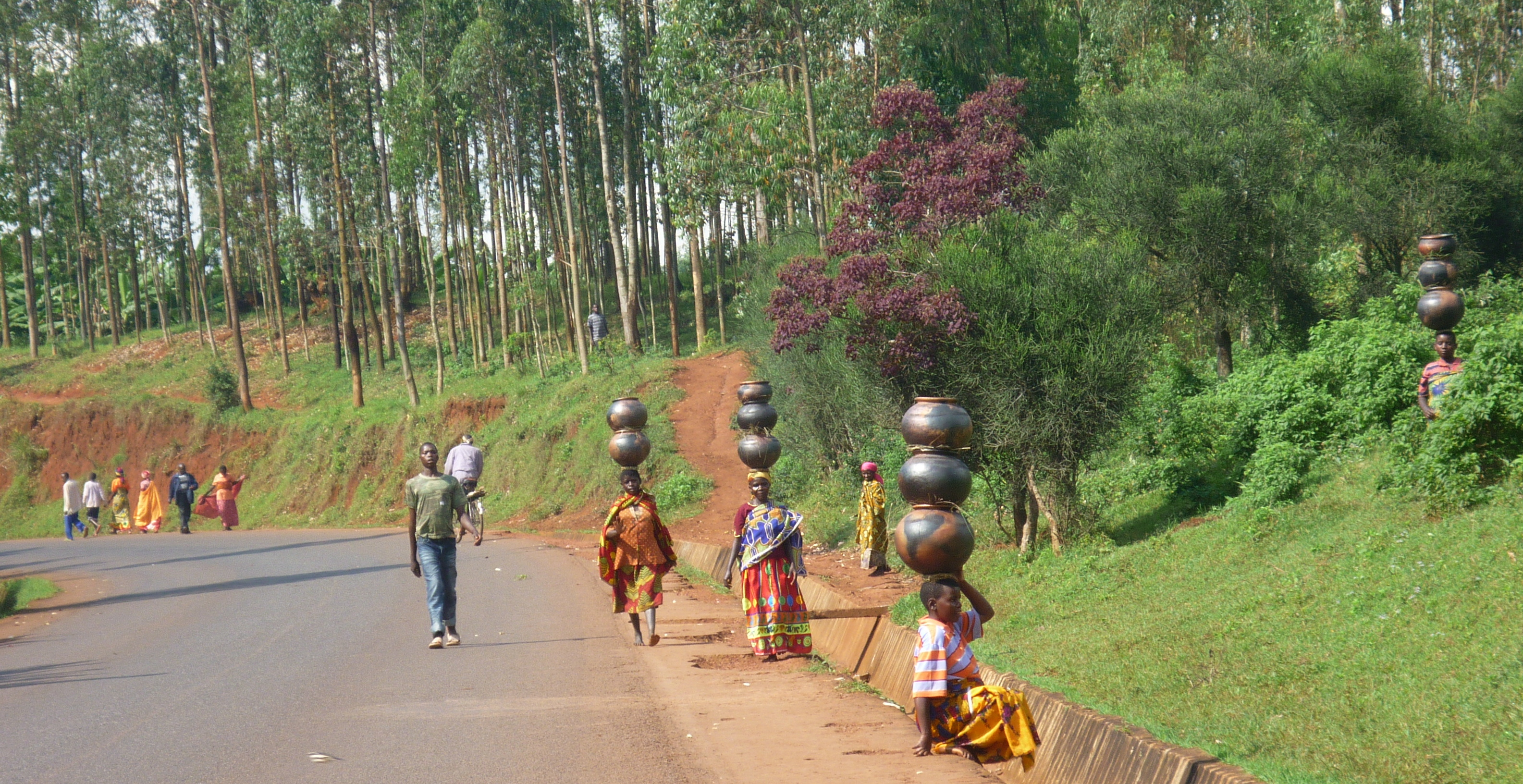 Femmes Burundaises en route pour le marché This is an image of "African people at work" from Burundi